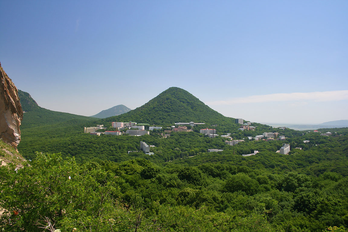 Панорама курортной части Железноводска с горы Медовой